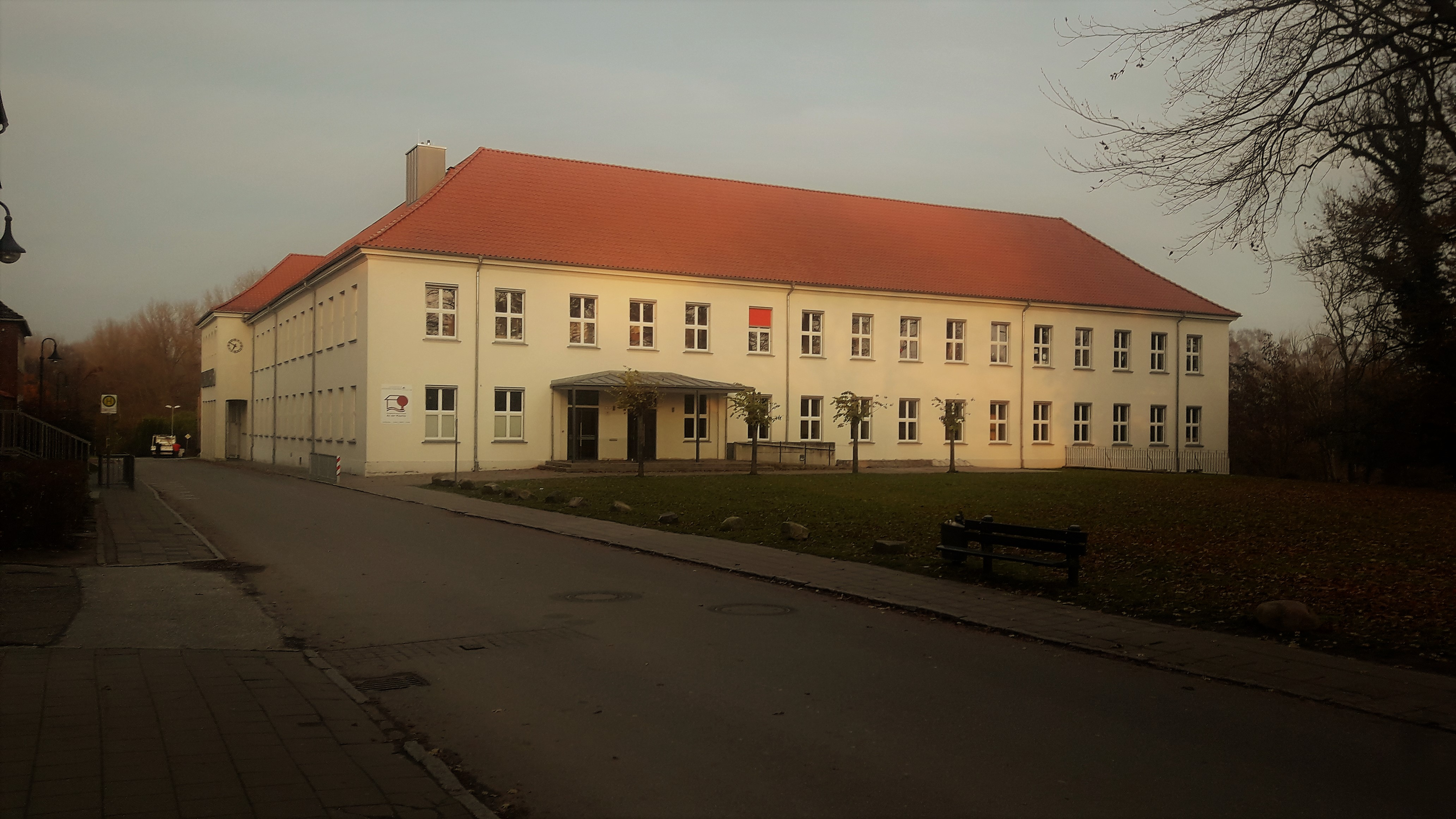 Vaade edelast kunagise piiskopilinnuse peahoone asukohale, mis jäi praegusest evangeelsest põhikoolist kas veidi ettepoole või siis samale kohale.